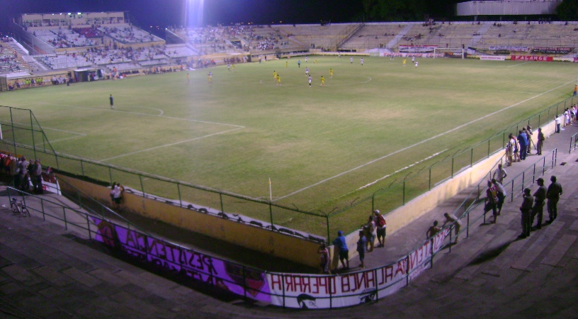 Estádio Presidente Vargas. Fortaleza, Ceará, Brasil.